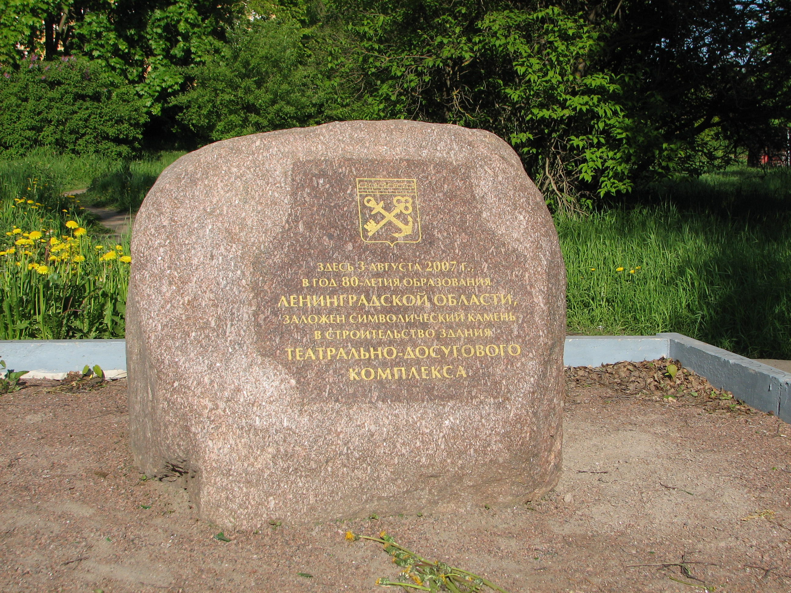 Камень на месте планируемого областного театра. Гатчина, Россия